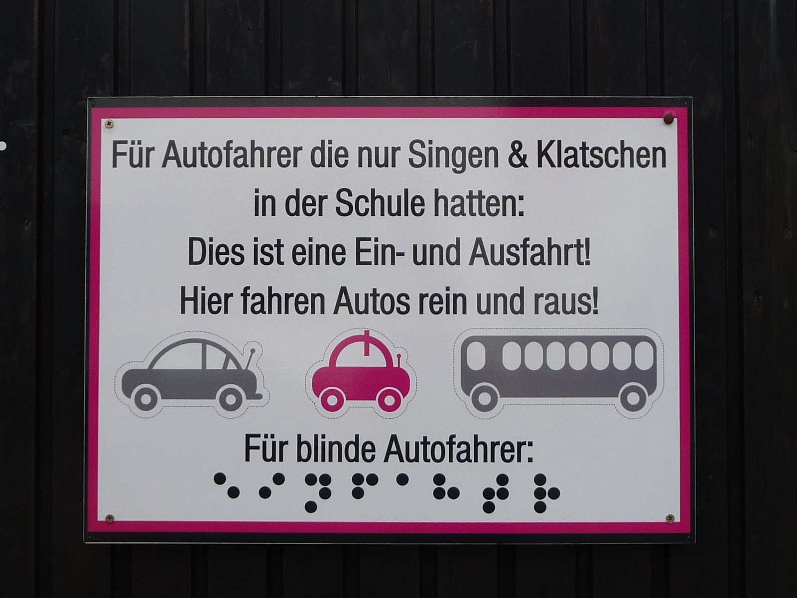 Haßloch, Germany - Transkription der Brailleschrift: EINFAHTR (⠑[E] ⠊[I] ⠝[N] ⠋[F] ⠁[A] ⠓[H] ⠞[T] ⠗[R])